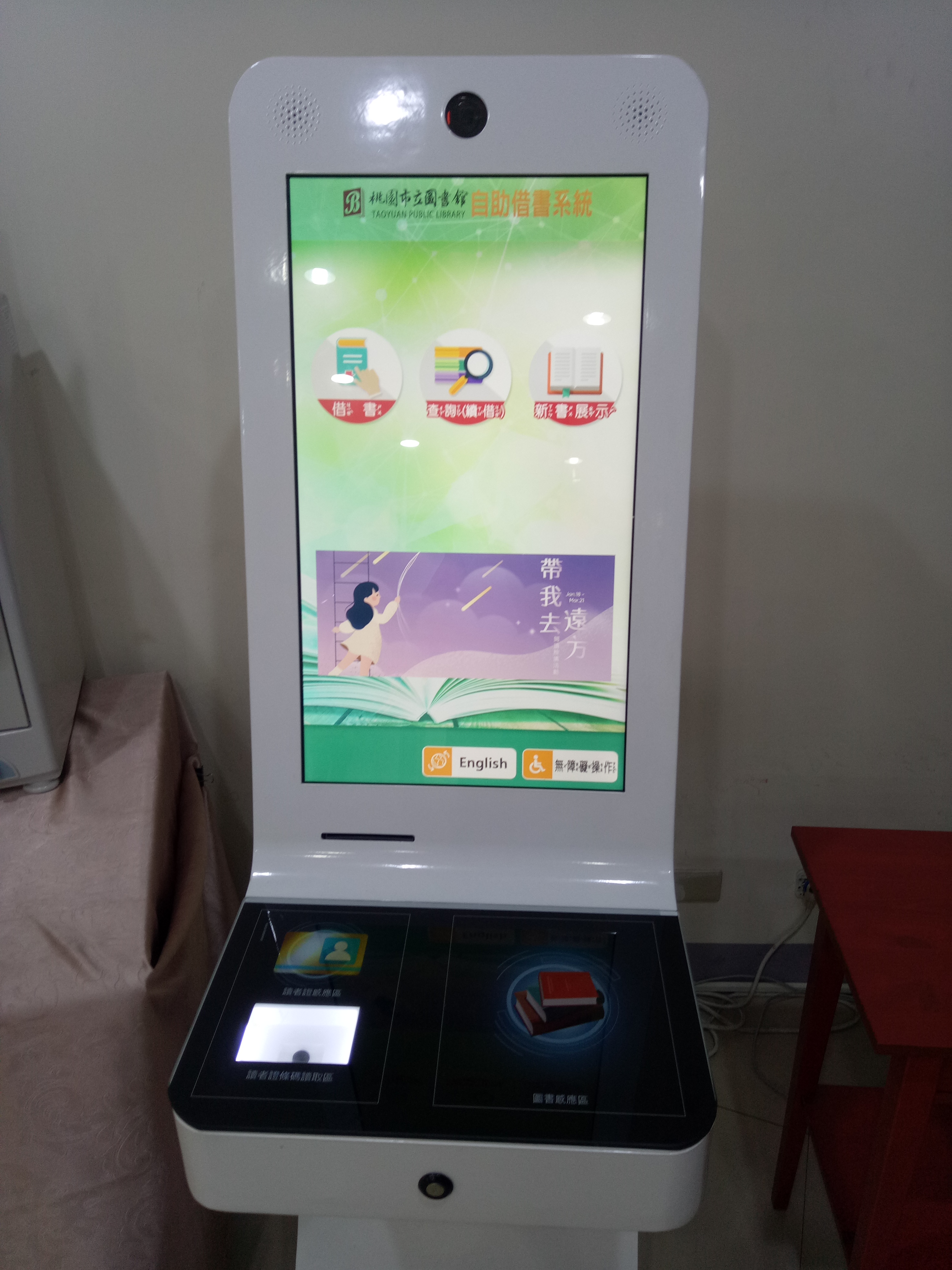 中文（台灣）: 桃園市立圖書館龜山分館自助借書機。